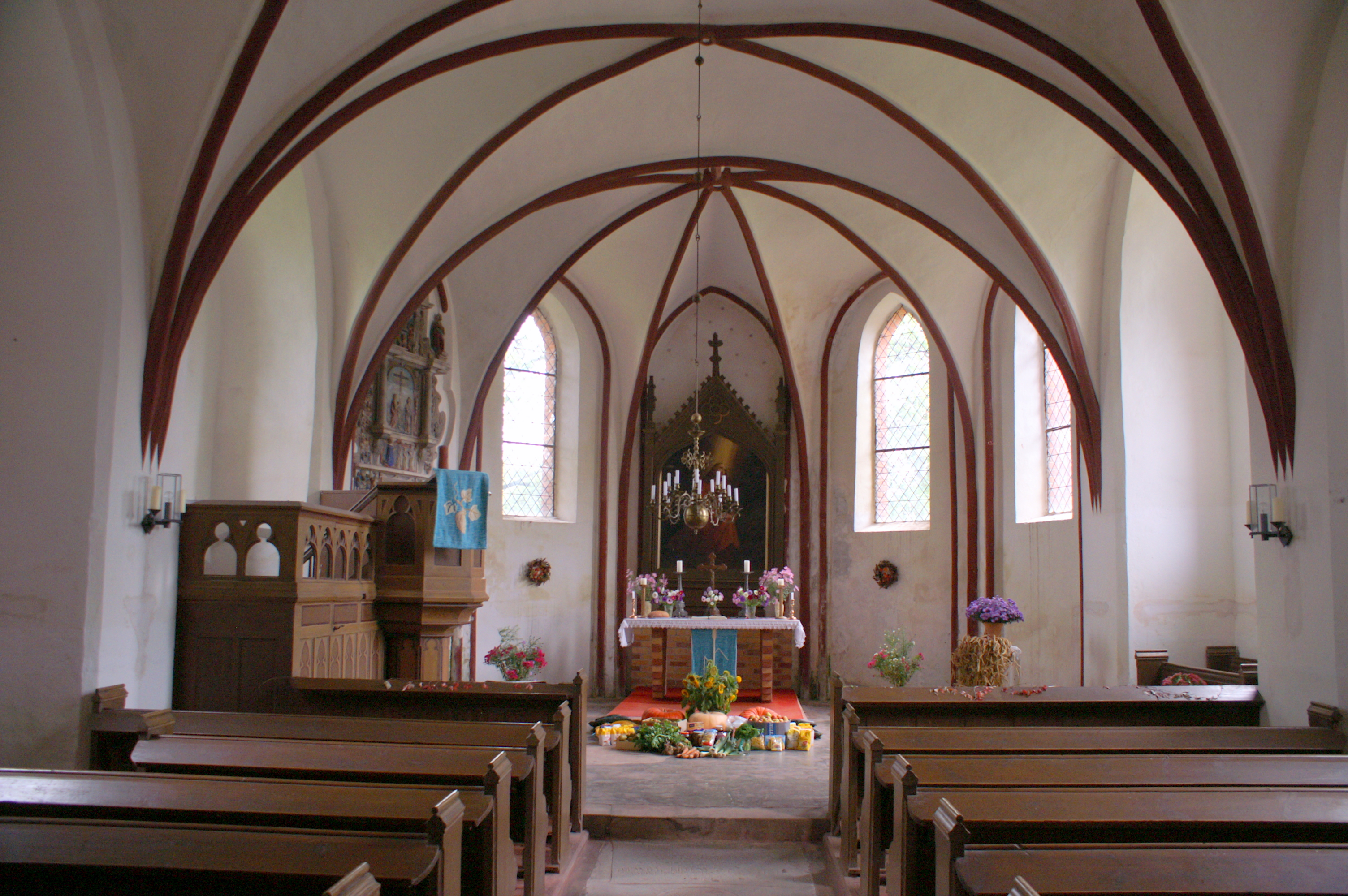 Kirche Schmarsow bei Kruckow, Innenraum, Blick zum Altar